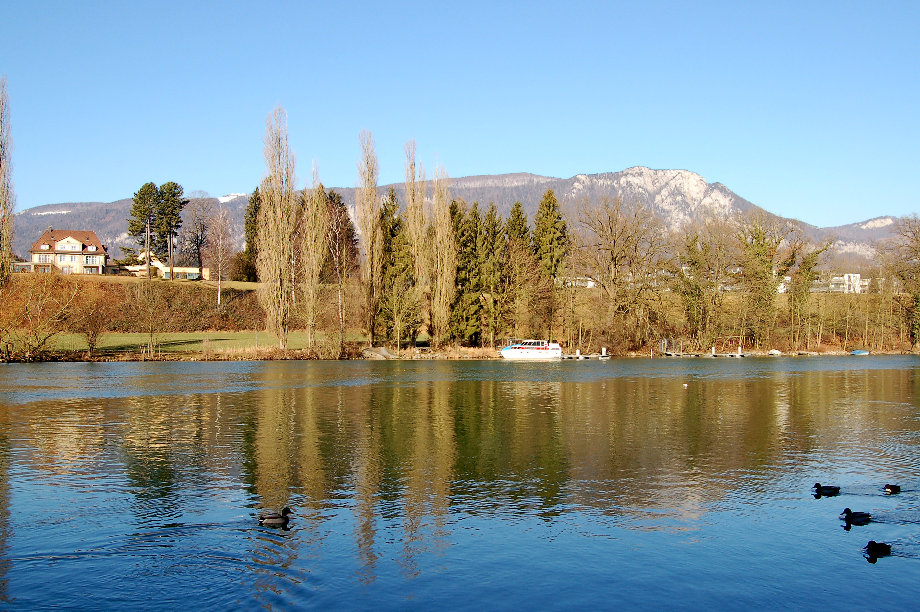 Feldbrunnen von Sueden